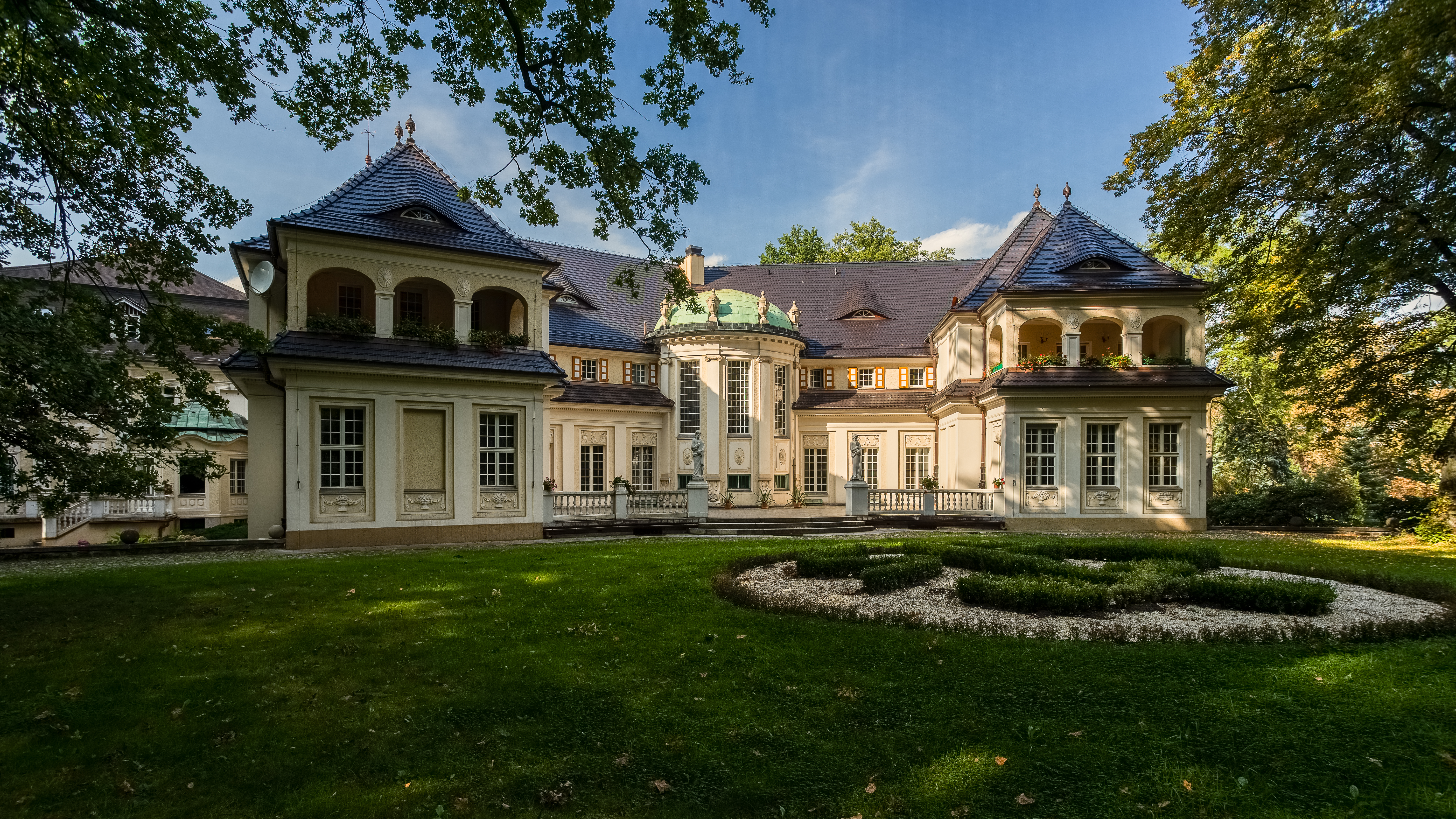 Zespół pałacowy, ob. klasztor salwatorianów: pałac „Nowy Zamek”